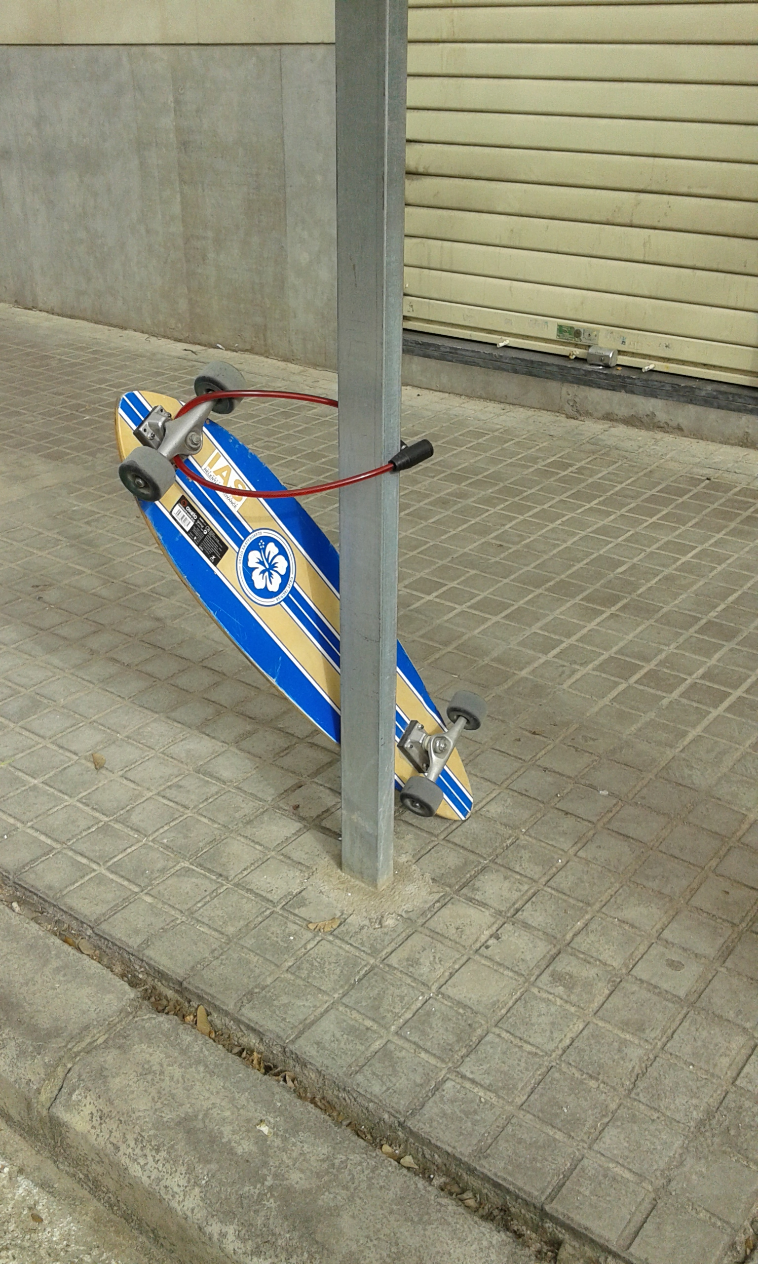 Longboard parked in València